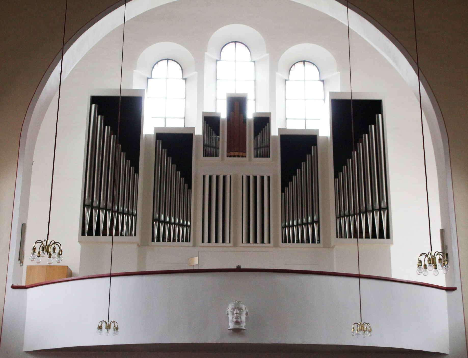 Orgel der Lutherkirche in München (Simon, 1969, III/39)